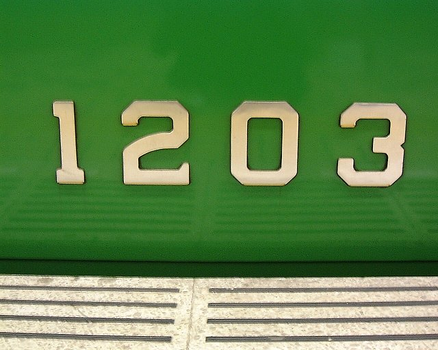 神戸市営地下鉄車輌の車輌番号書体（神戸市交通局1000形電車1203号 車体側面）